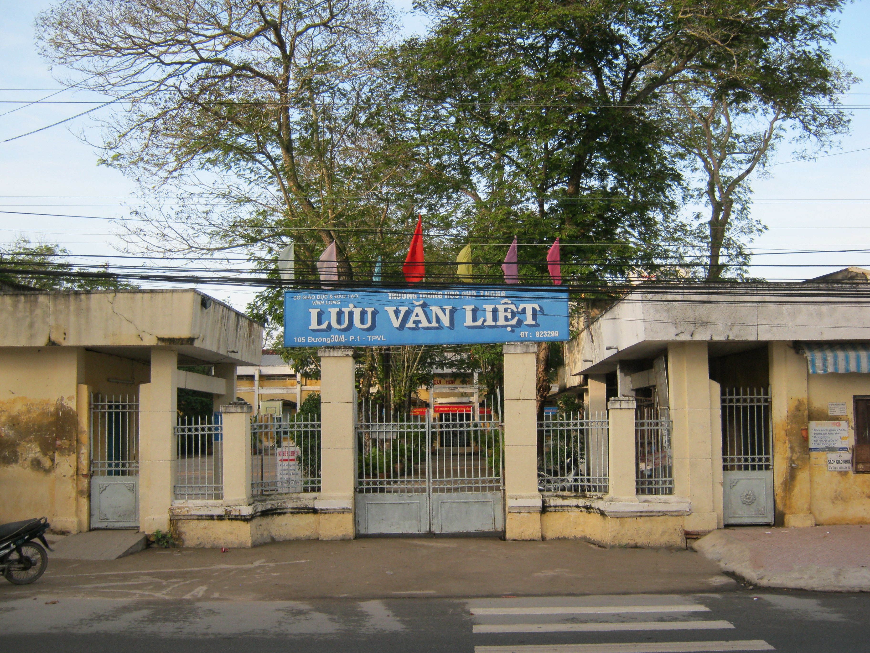 Trường Trung học phổ thông Lưu Văn Liệt hiện tọa lạc tại phường, thành phố Vĩnh Long (Việt Nam).